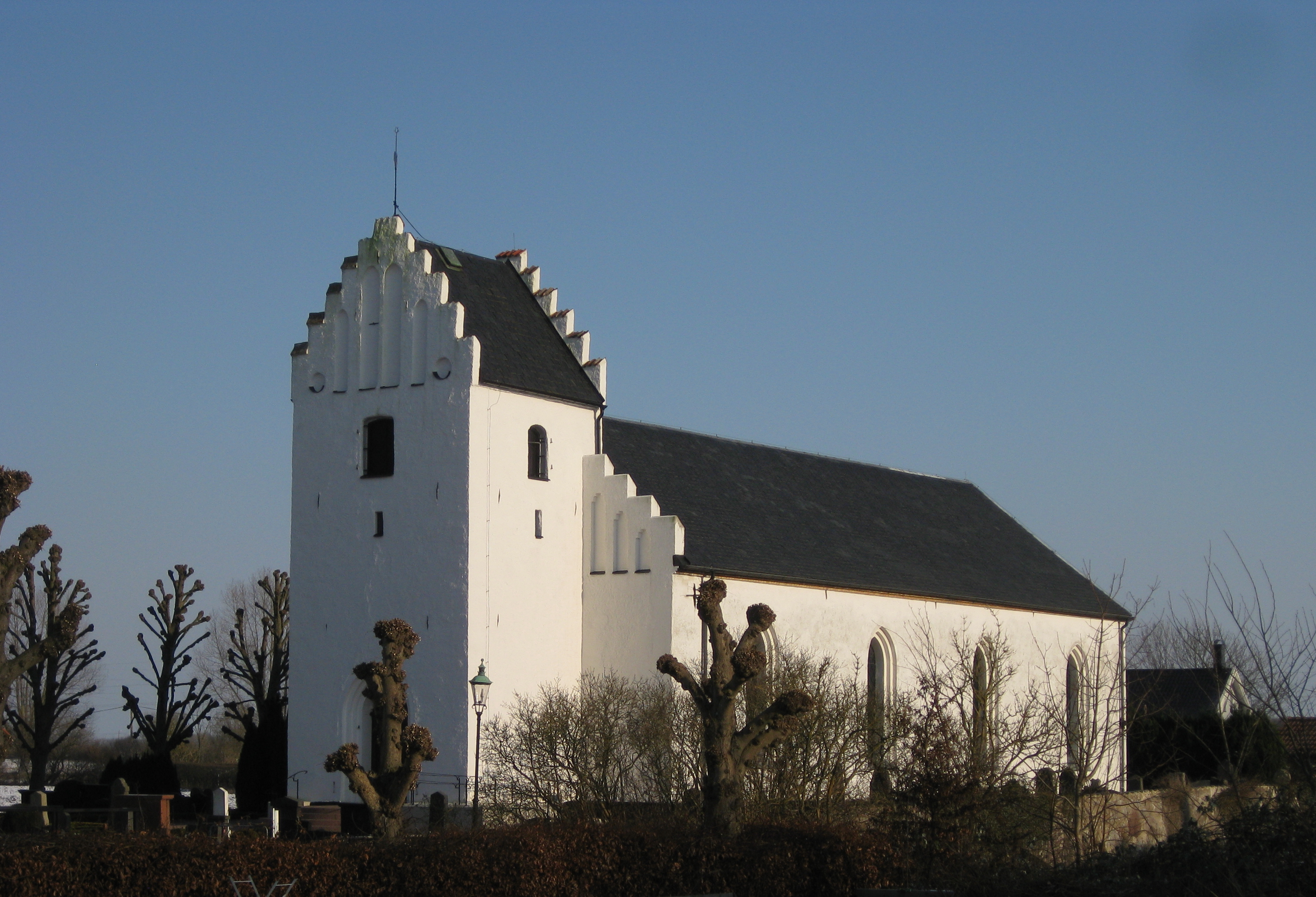 Fjärestads kyrka 2012